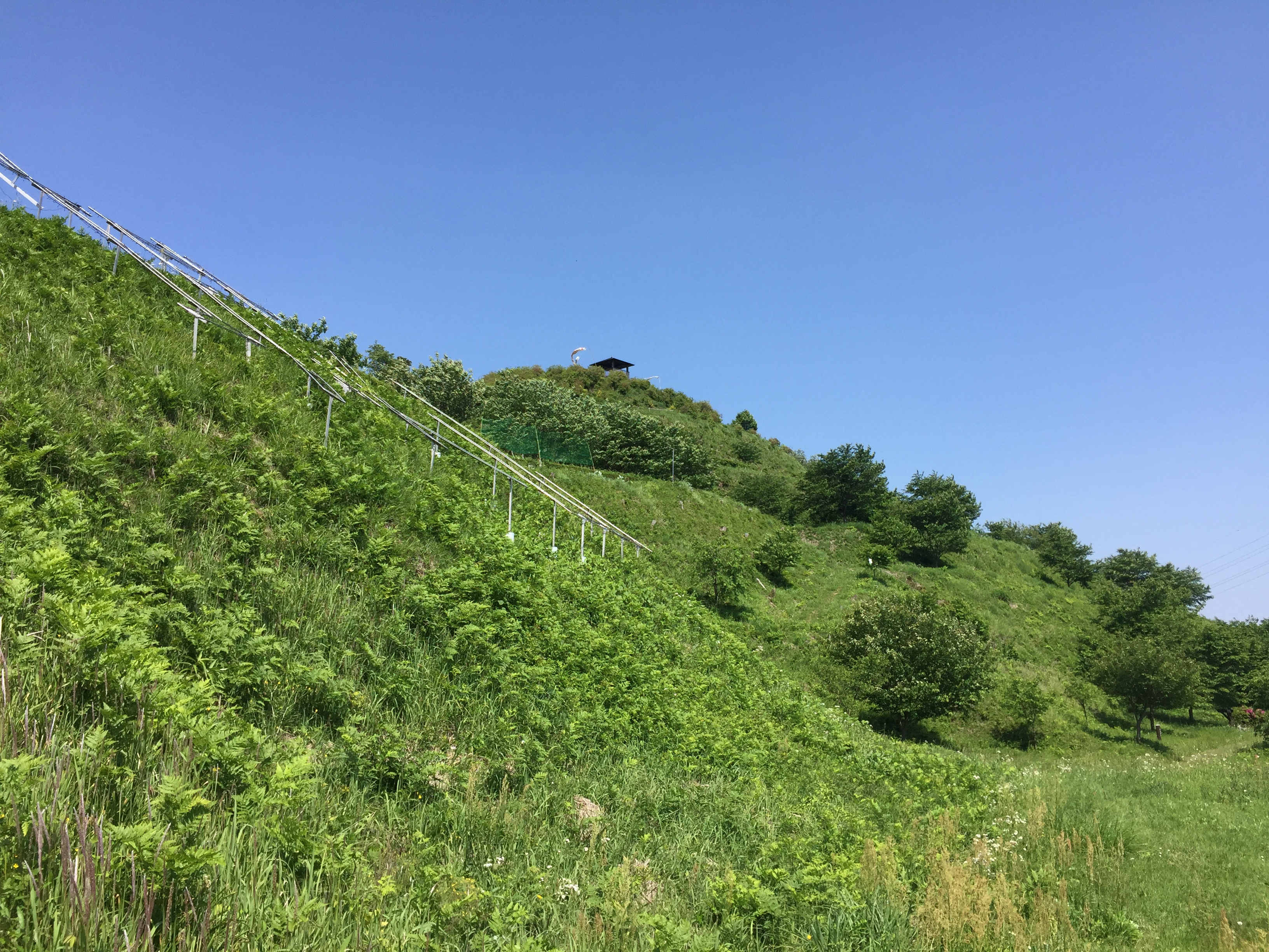 栃木県栃木市皆川城内町の皆川城址公園。